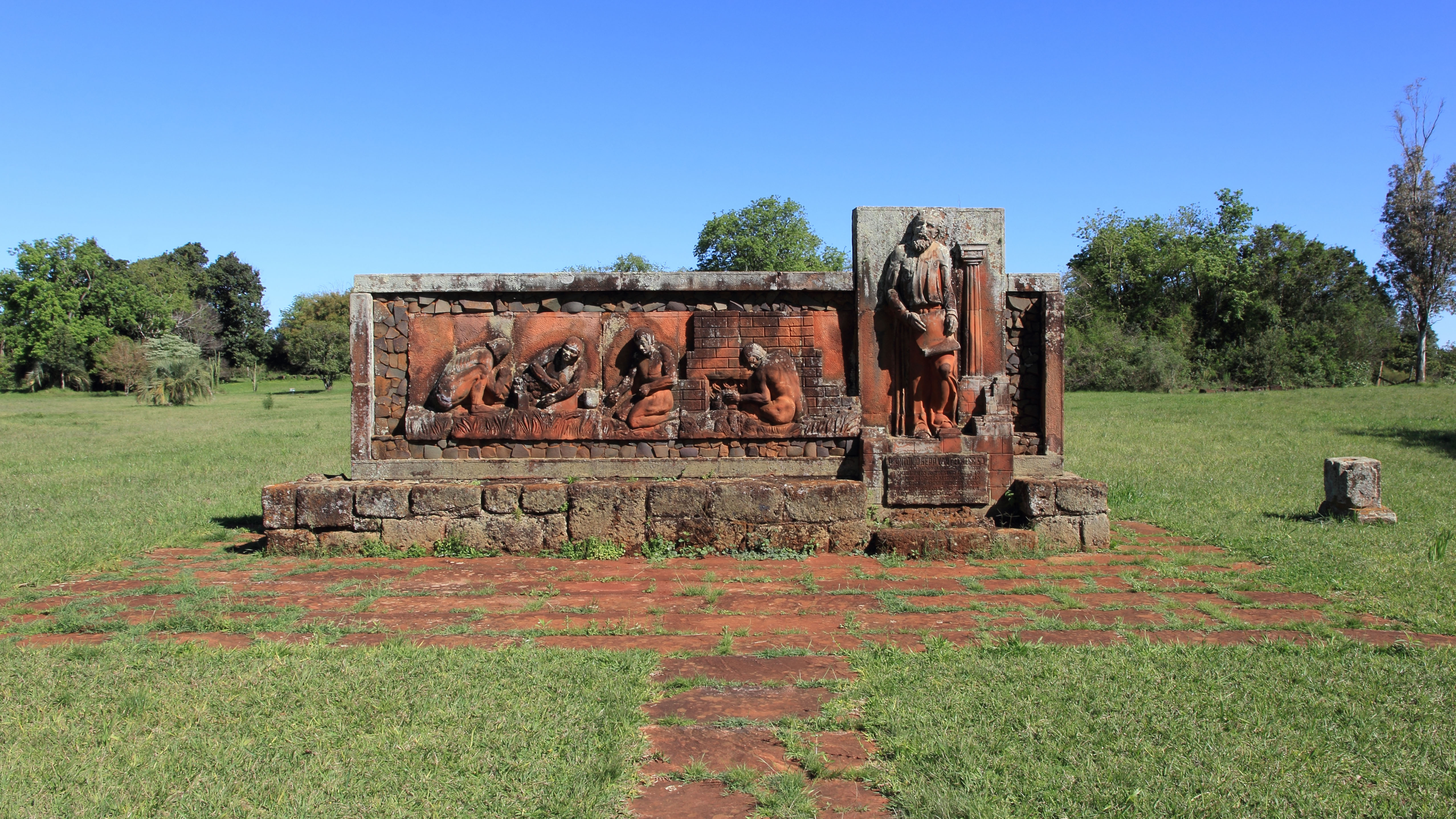 Sítio Arqueológico de São João Batista em Entre-Ijuís, RS.